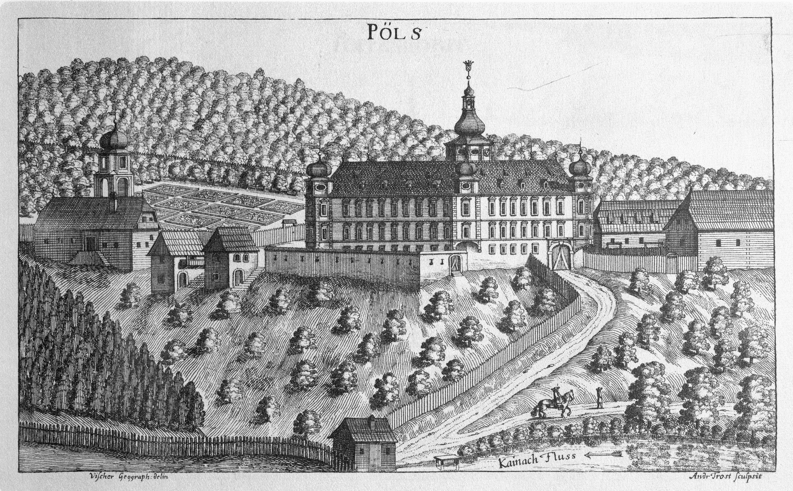 G. M. Vischers Käyserlichen Geographi, Topographia Ducatus Stiriae, Das ist: Eigentliche Delineation / und Abbildung aller Städte / Schlösser / Marcktfleck / Lustgärten / Probsteyen / Stiffter / Clöster und Kirchen / so es sich im Herzogthumb Steyrmarck befinden; Und anjetzo Umb einen billichen Preyß zu finden seynd Bey Johann Bitsch Universitäts Buchhandlern / Auff dem Juden=Platz bey der guldenen Saulen. Graz 1681 Die Nummerierung der Dateien folgt der alphabetischen Reihung der Ortsnamen und entspricht nicht dem Vischer-Register